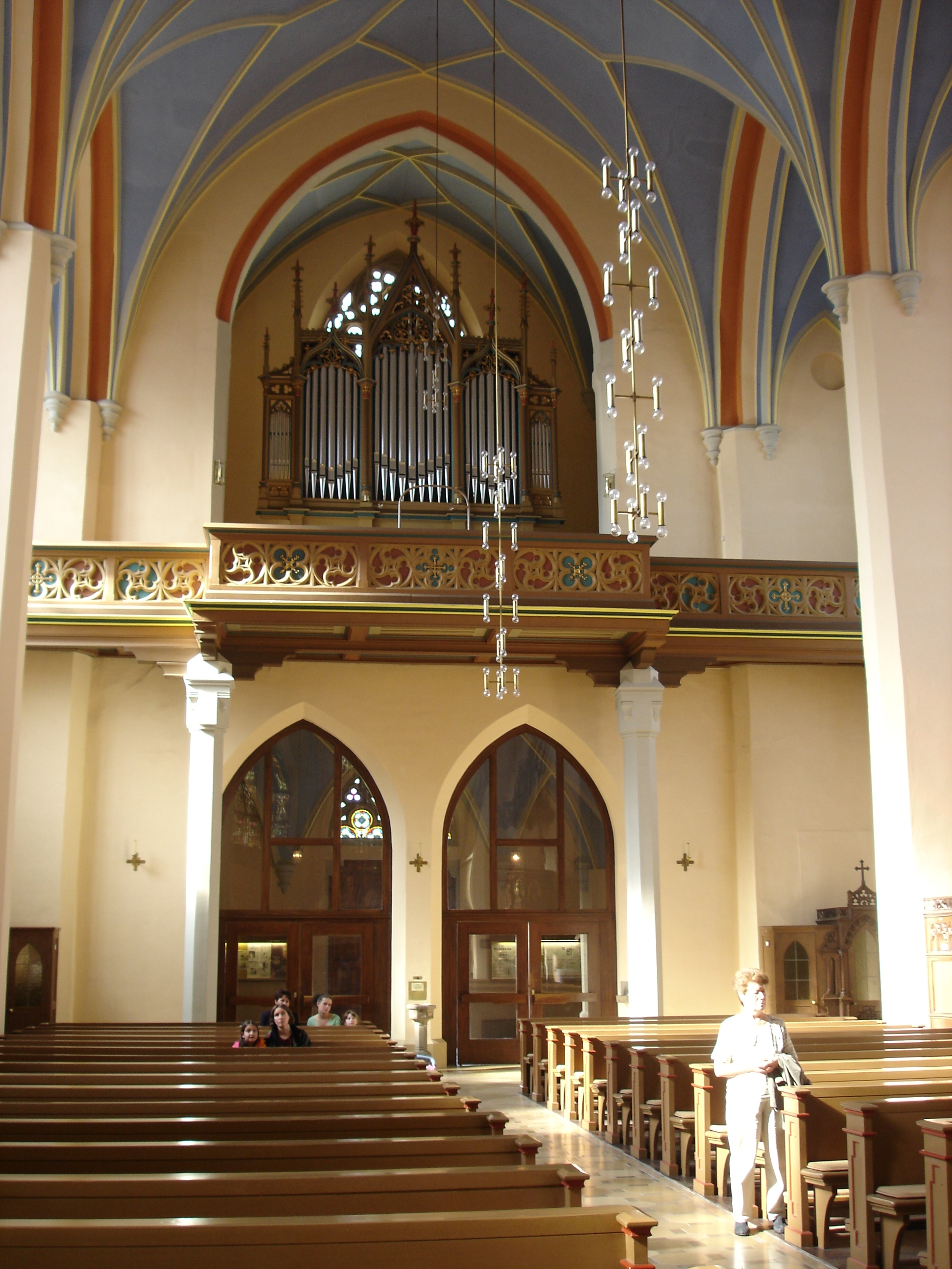 St. Marien Hof, Steinmeyer-Orgel